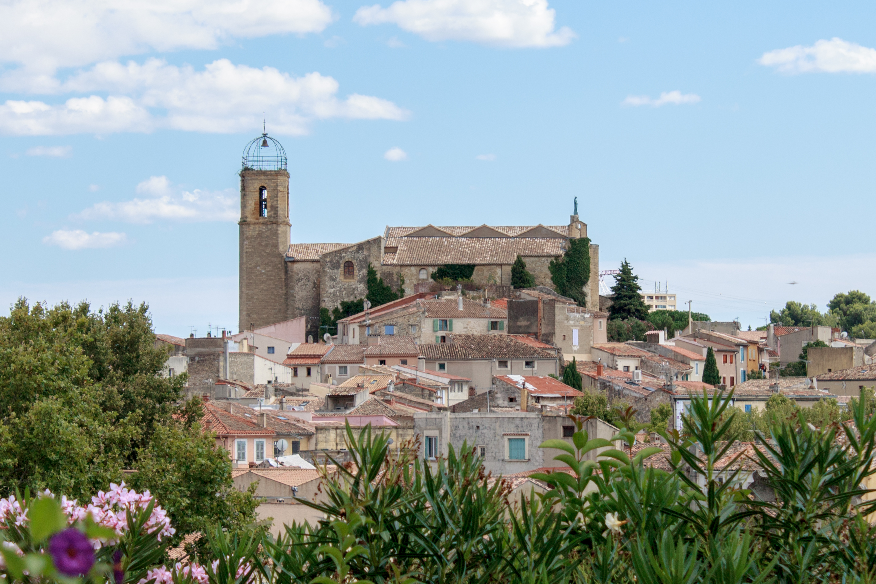 Vue générale du centre historique de la ville d'Istres.